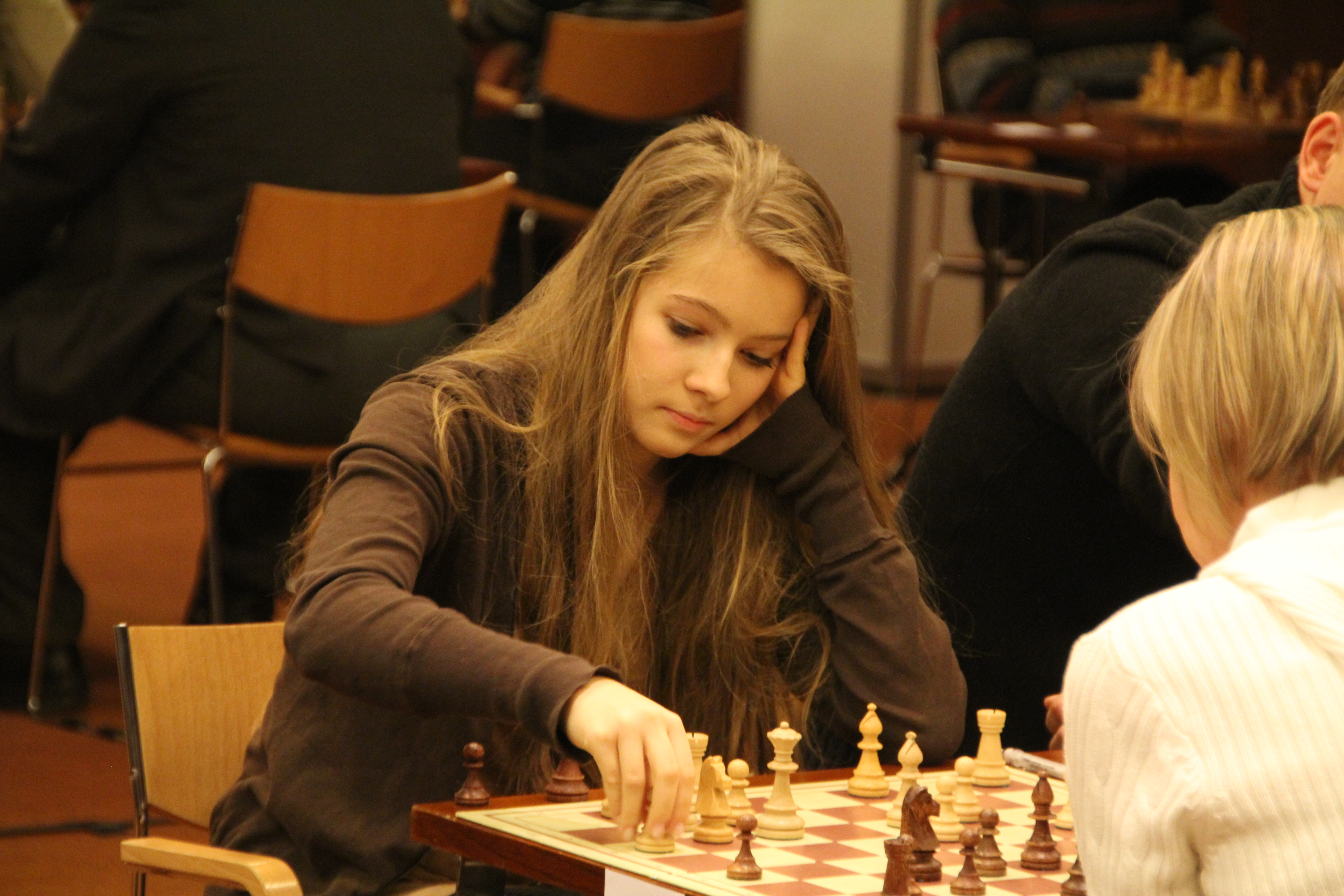 Triin Narva mängimas Paul Kerese mälestusturniiril.